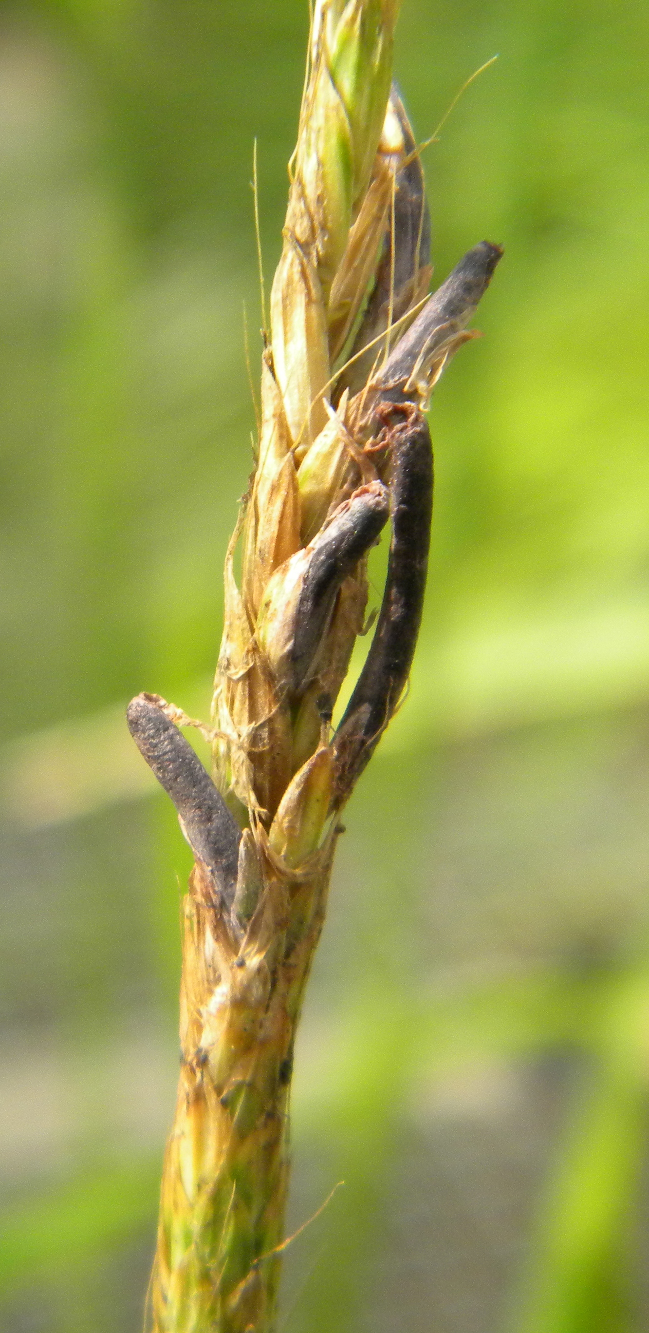 Ergot sur vulpin